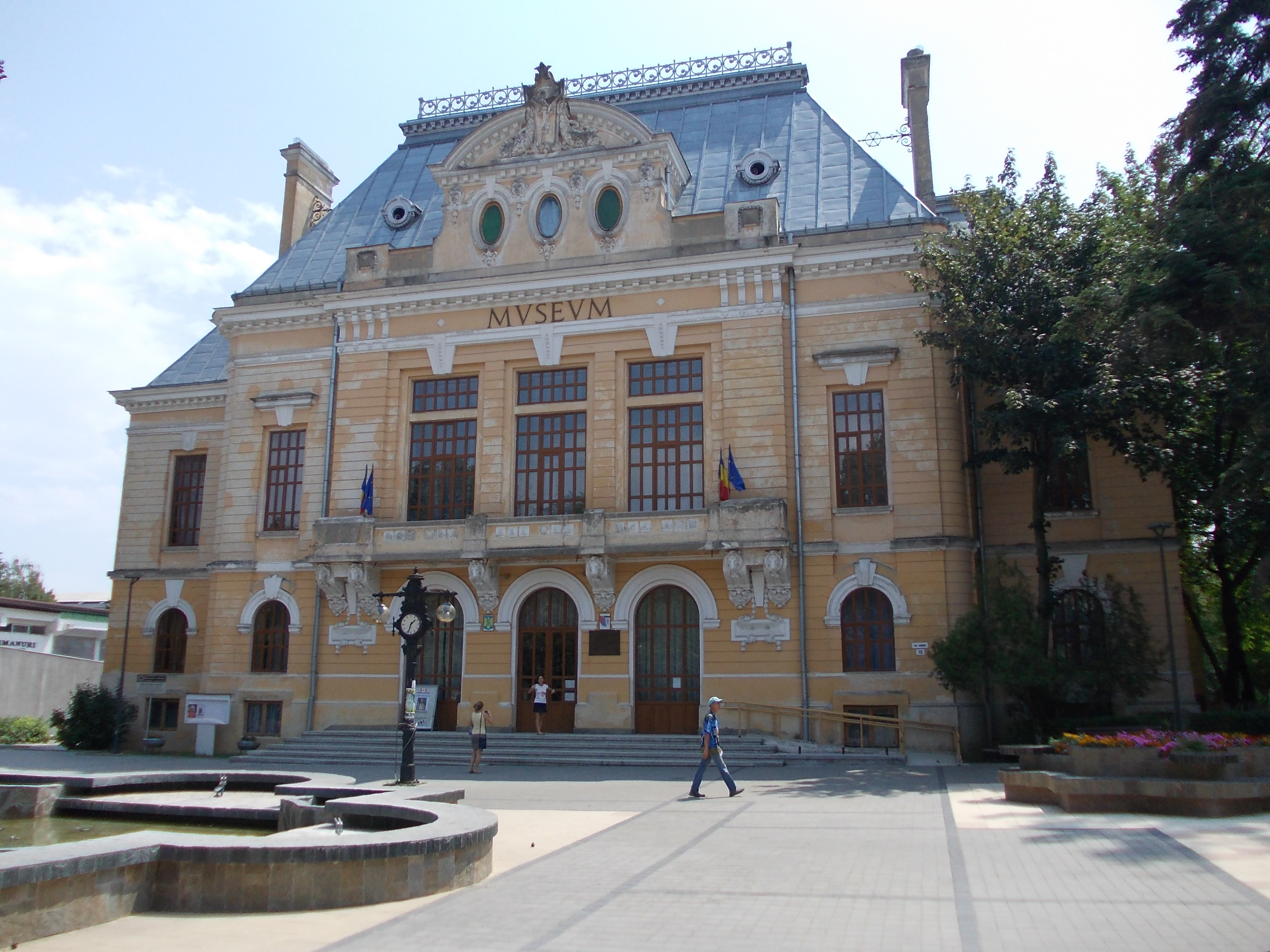 Prefectura Veche din Botoșani, în prezent Muzeul Județean Botoșani.